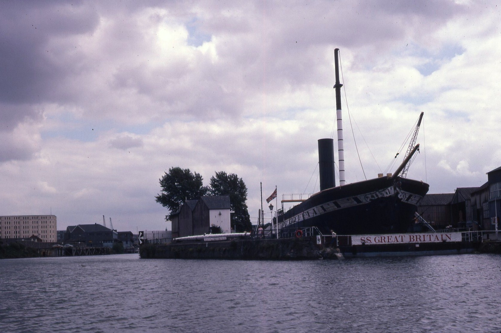 Scan from 35mm slide.